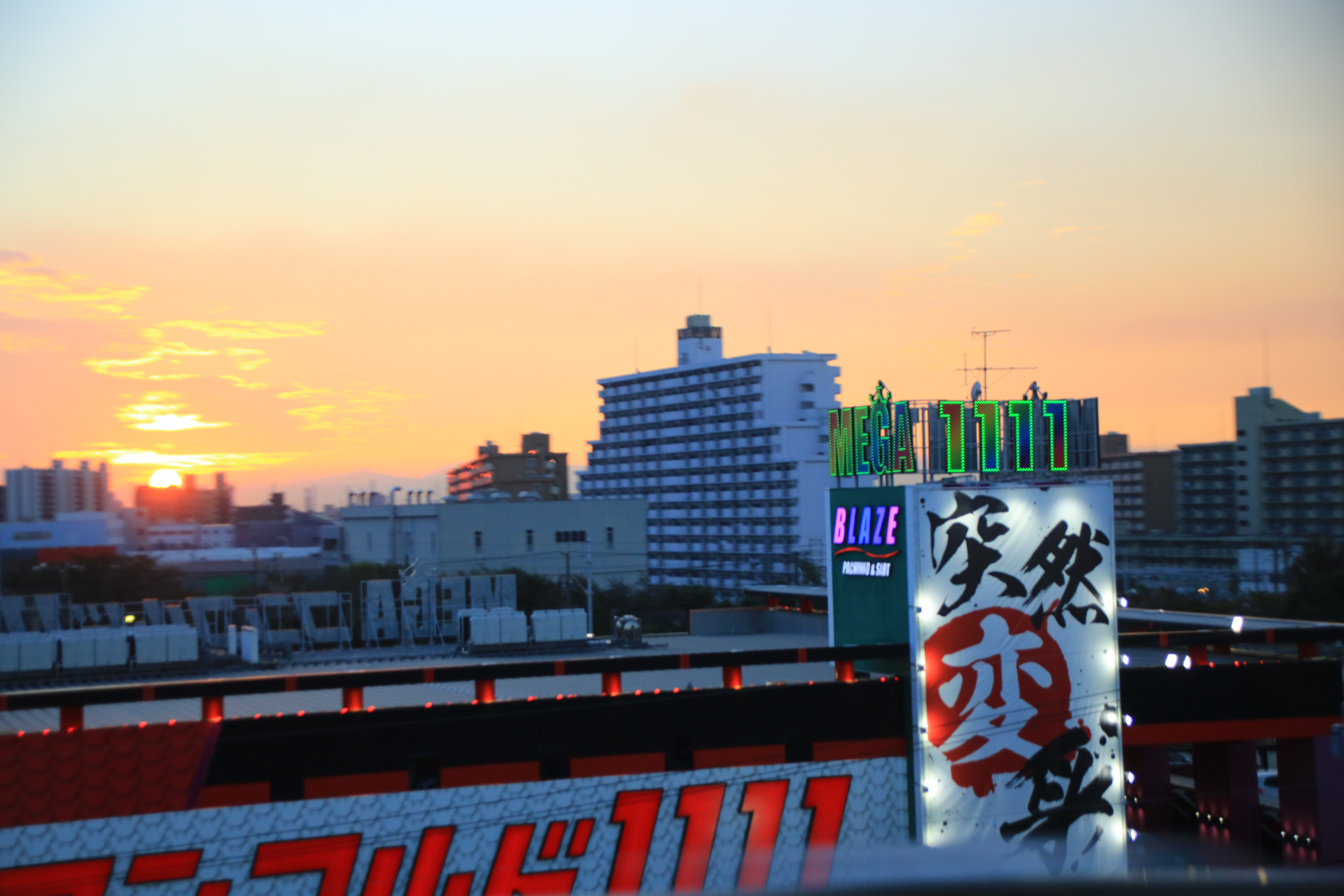 Nagoya Sunset 名古屋 落日